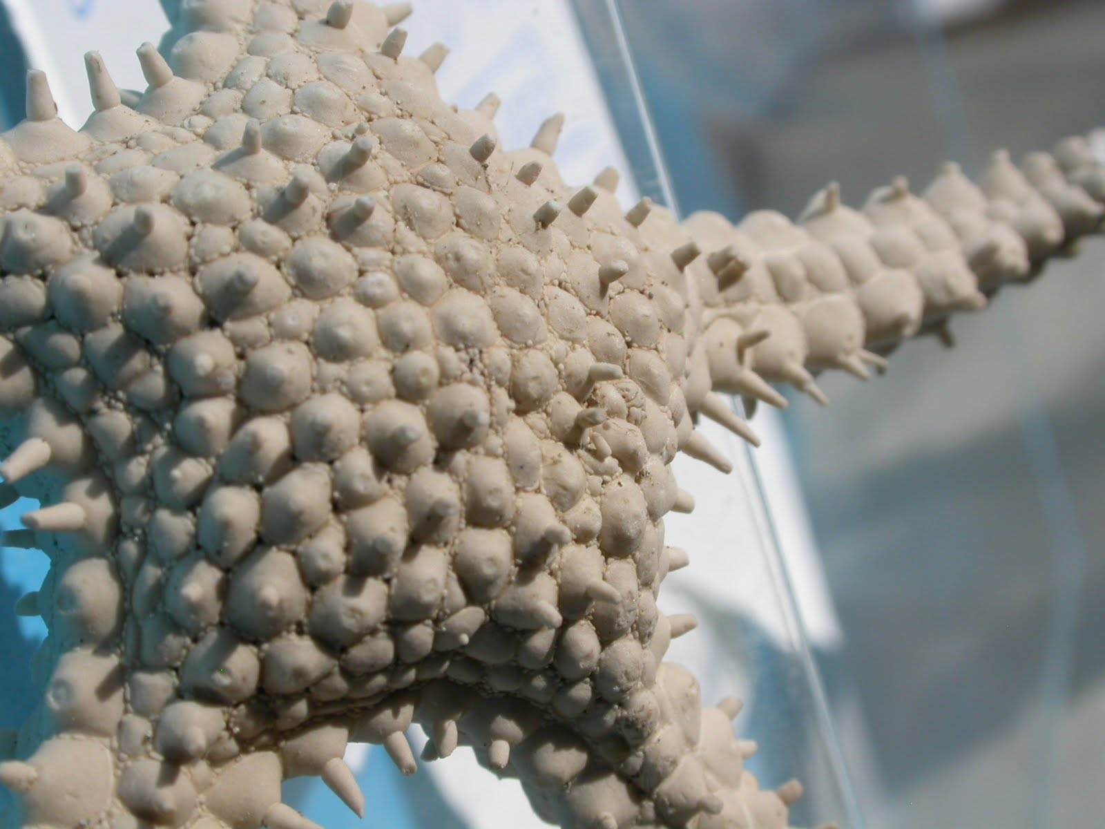 L'étoile de mer Eratosaster jennae (spécimen séché).